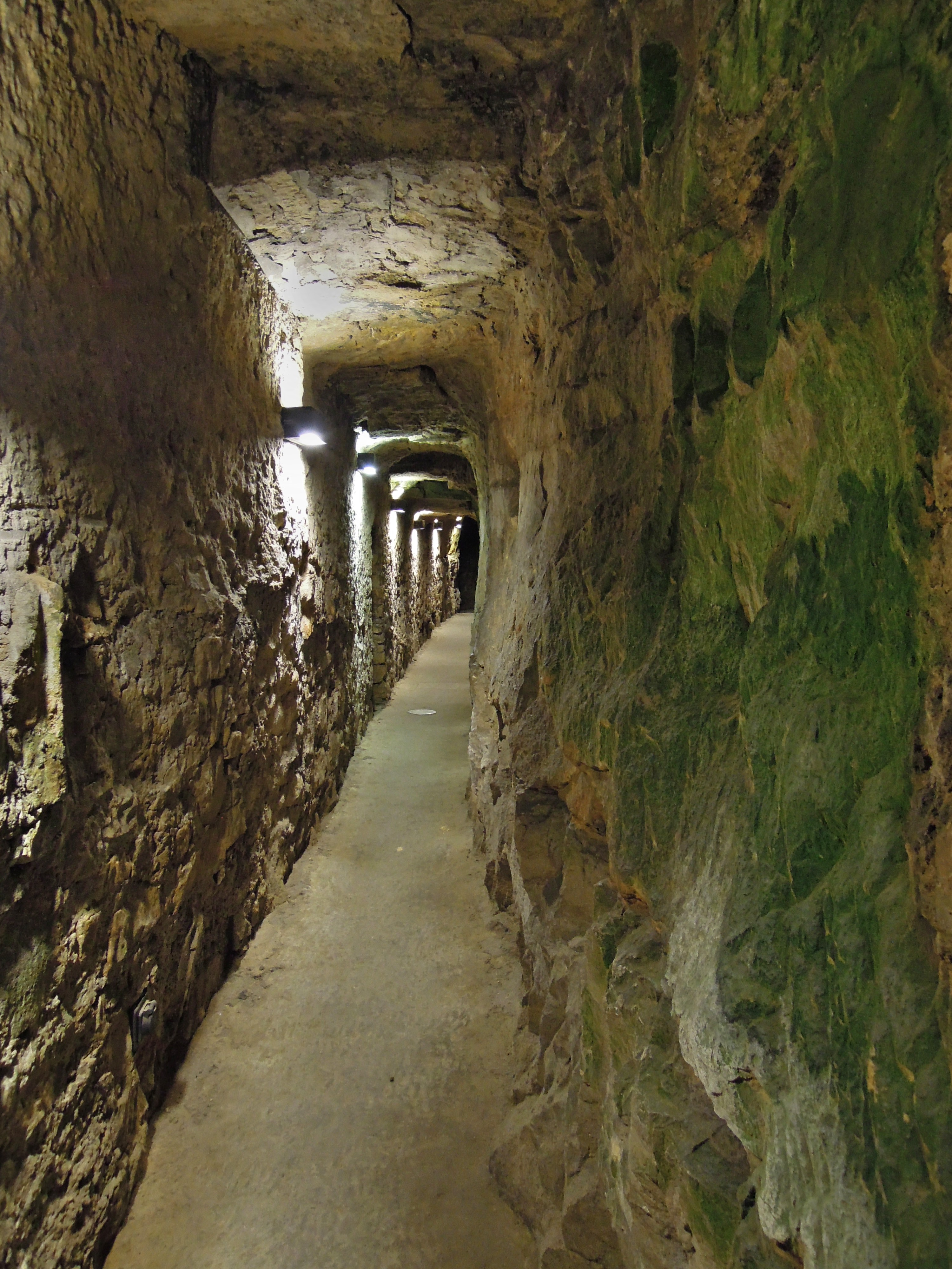 Gang in den Kasematten von Luxemburg